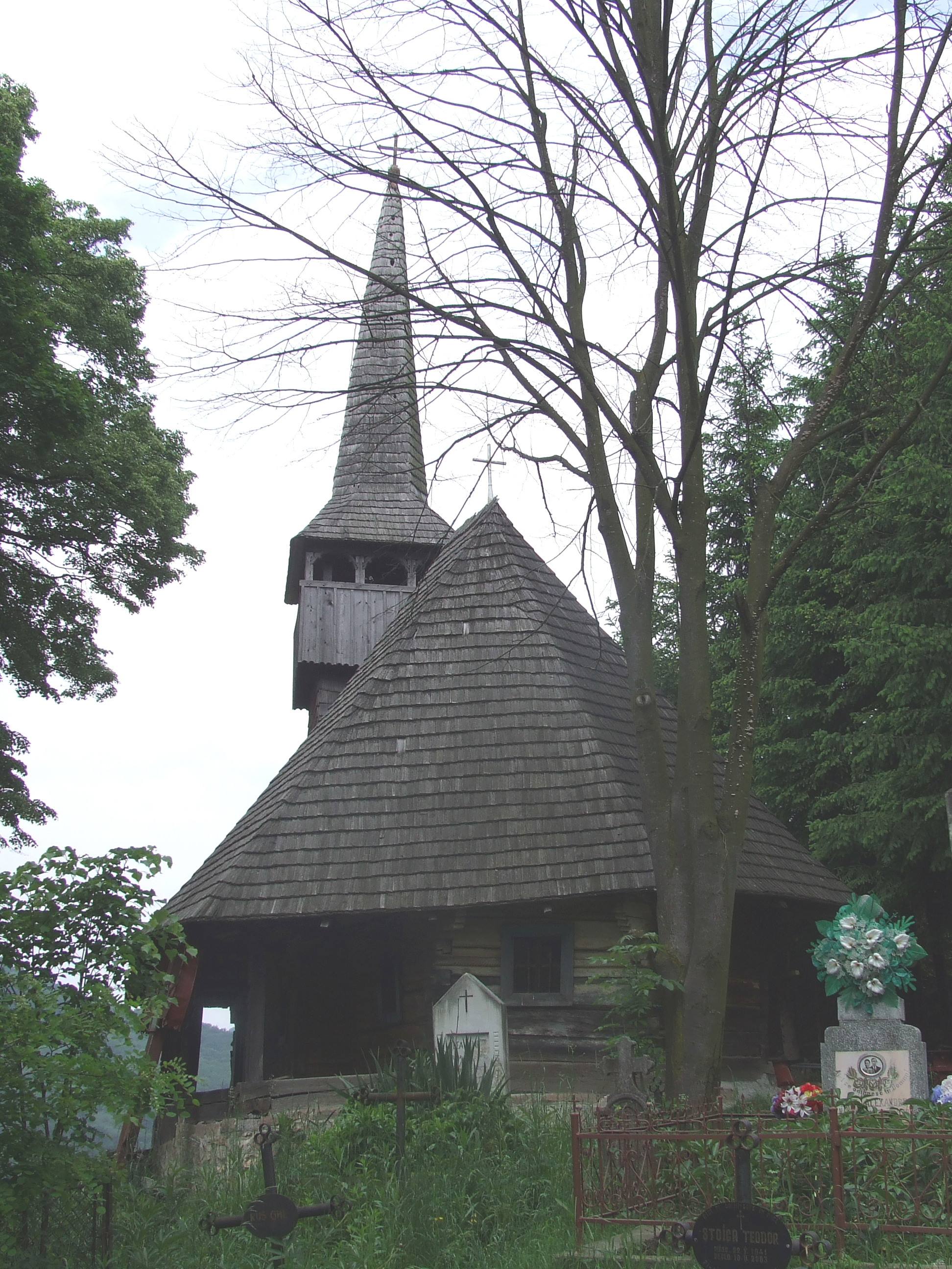 Bucea